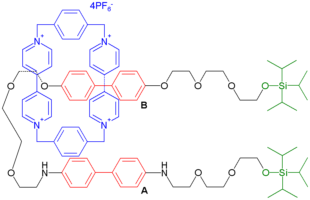 Mol Switch Stoddart 1994